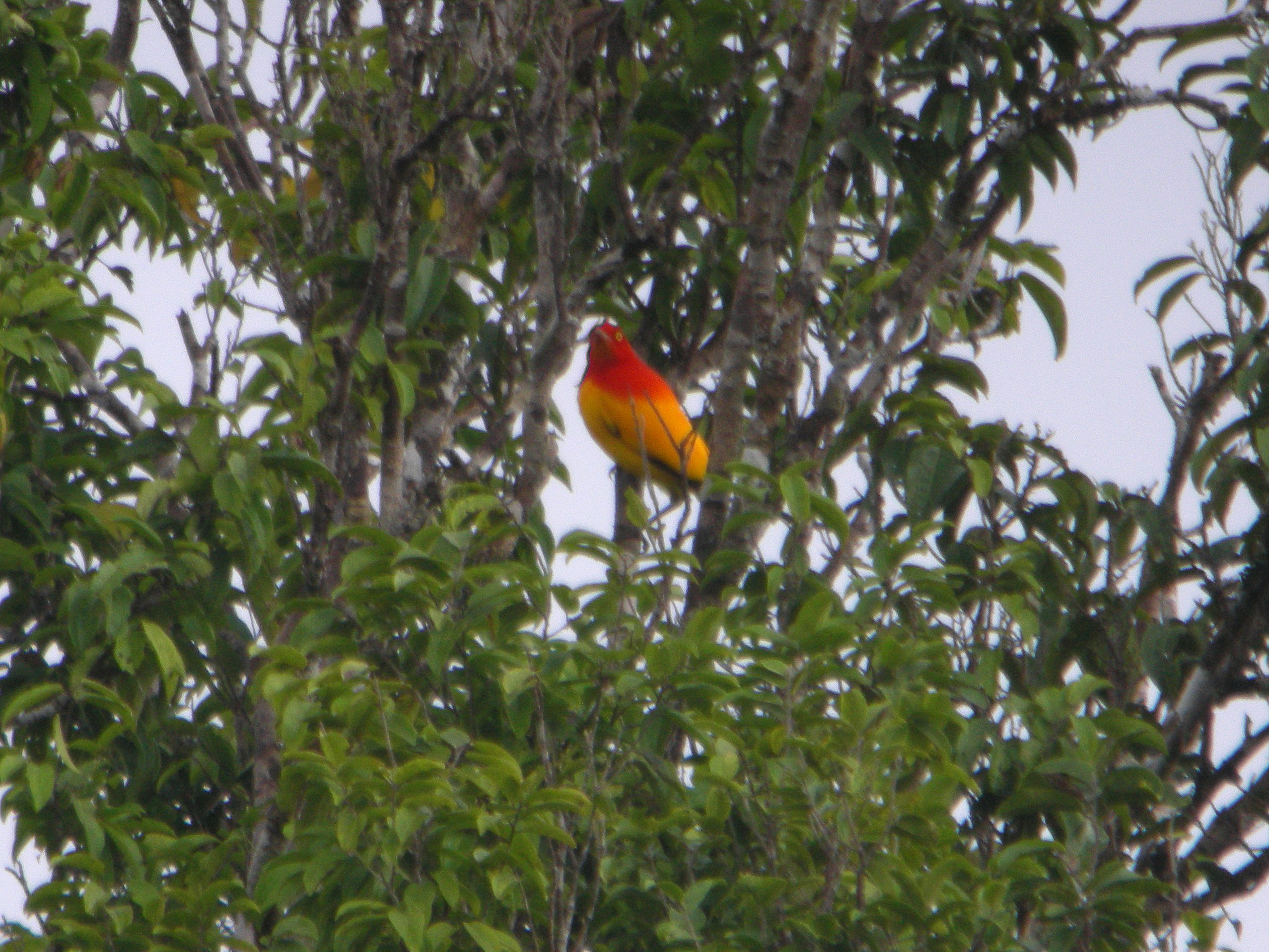 Flame Bowerbird